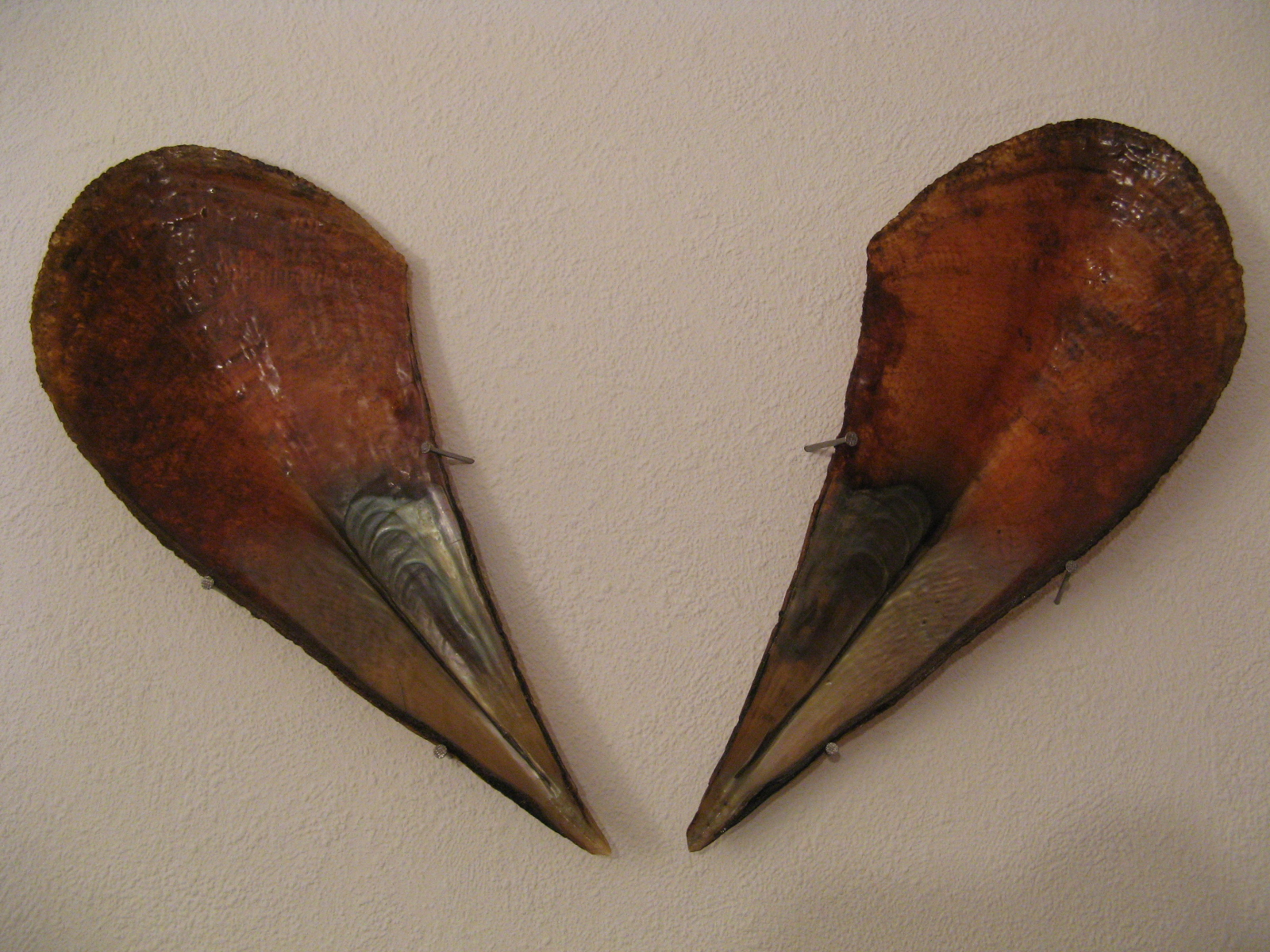 Das Bild zeigt die Schalen einer Edlen Steckmuschel.